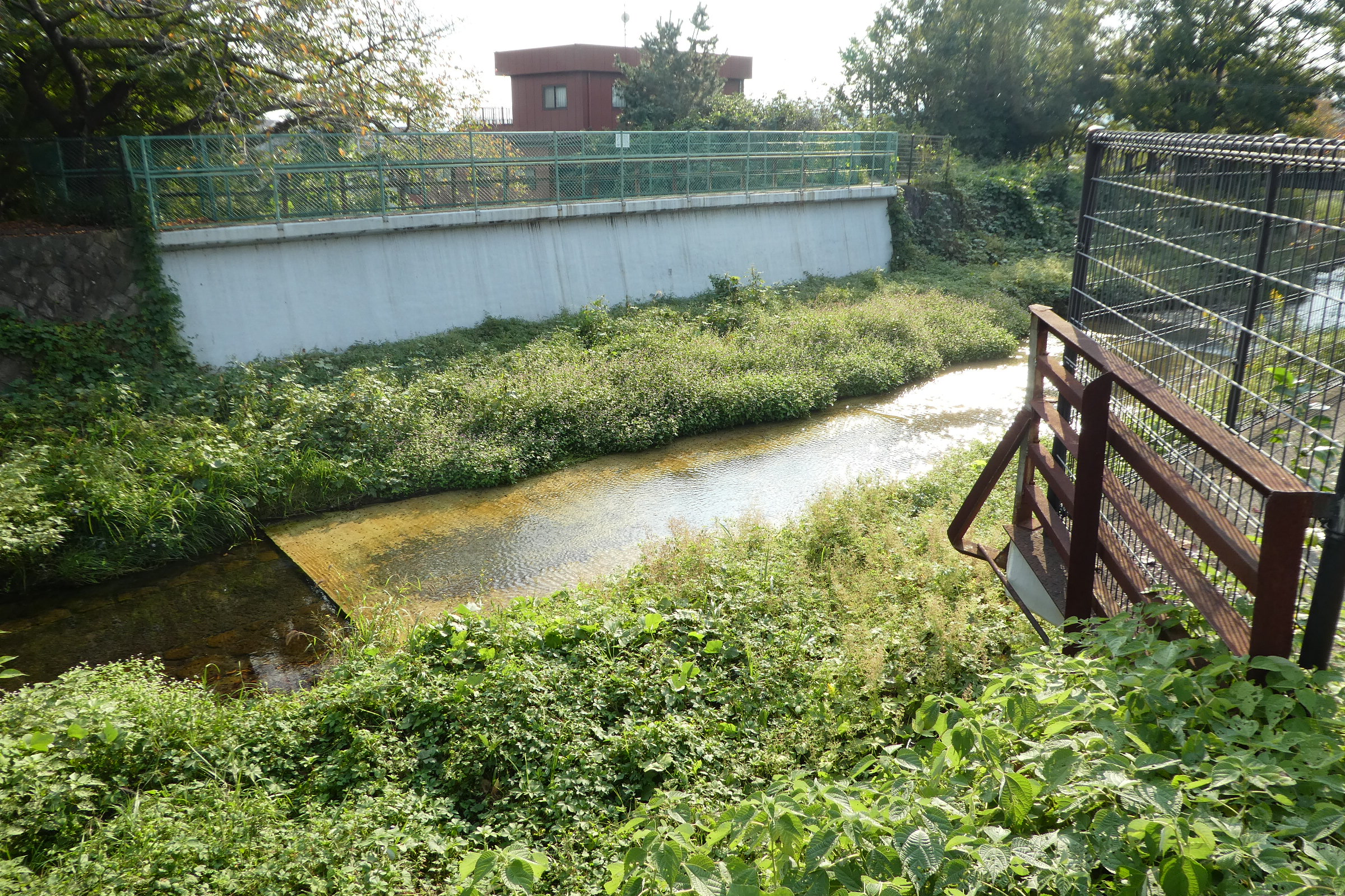 JR奈良線のトンネルの上を流れる玉川。